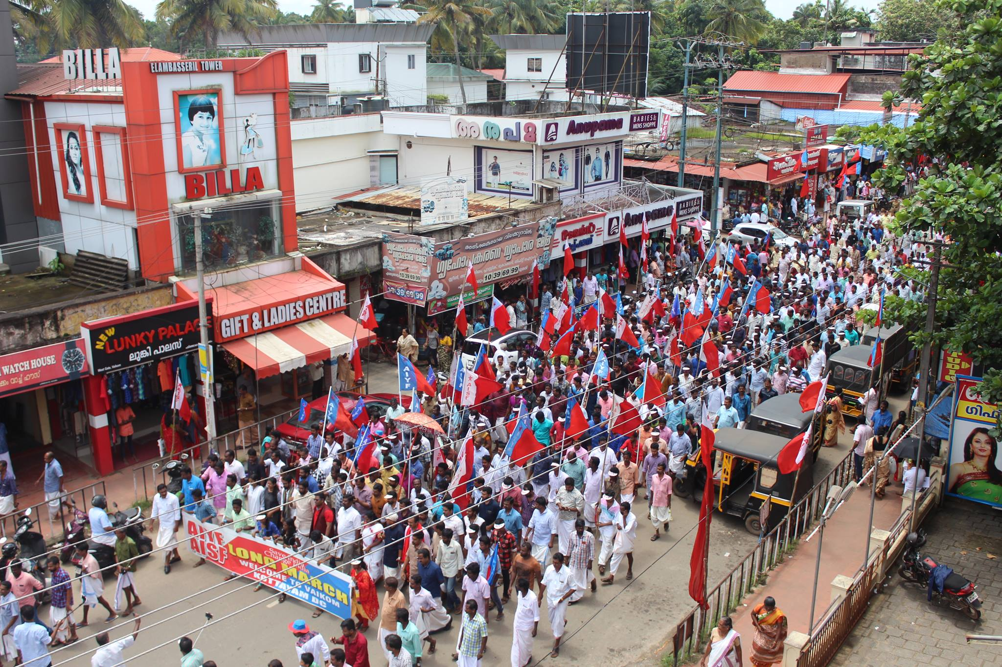 "സേവ് ഇന്ത്യ..ചേഞ്ച് ഇന്ത്യ.." എന്ന മുദ്രാവാക്യമുയർത്തി എ ഐ എസ് എഫും എ ഐ വൈ എഫും കന്യാകുമാരി മുതൽ ഹുസ്സൈനിവാല വരെ സംഘടിപ്പിച്ച ലോങ്ങ് മാർച്ചിന് കോട്ടയം ജില്ലയിലെ വൈക്കത്ത് നൽകിയ സ്വീകരണം.....